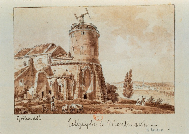 Télégraphe de Montmartre, dessin de Goblain, Antoine-Louis (1779-18..)